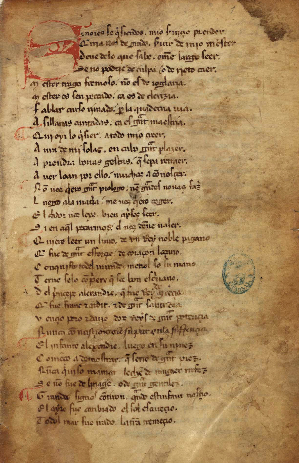 Libro de Alexandre (primera mitad siglo XIII), ms. del siglo XIV. Incipit: Senores, se quisierdes mio seruiçio prender (h. 1), 154 h. perg.Signatura: VITR/5/10 BNE